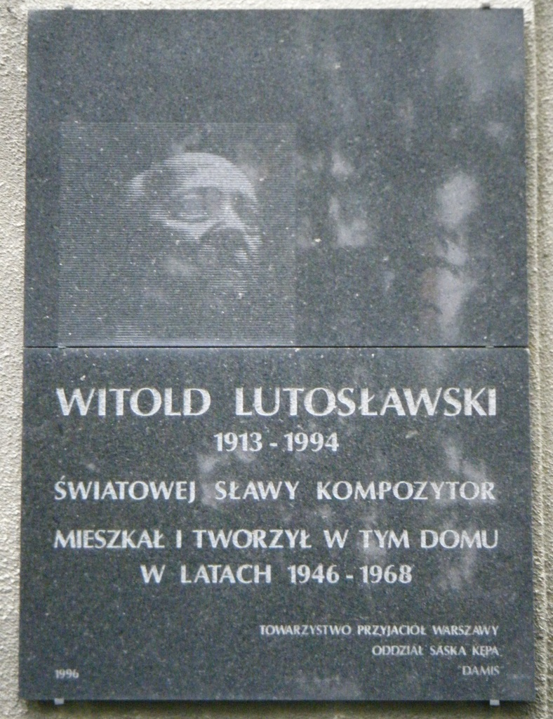 Tablica upamiętniająca Witolda Lutosławskiego. Warszawa, Saska Kępa, ul. Zwycięzców 39.